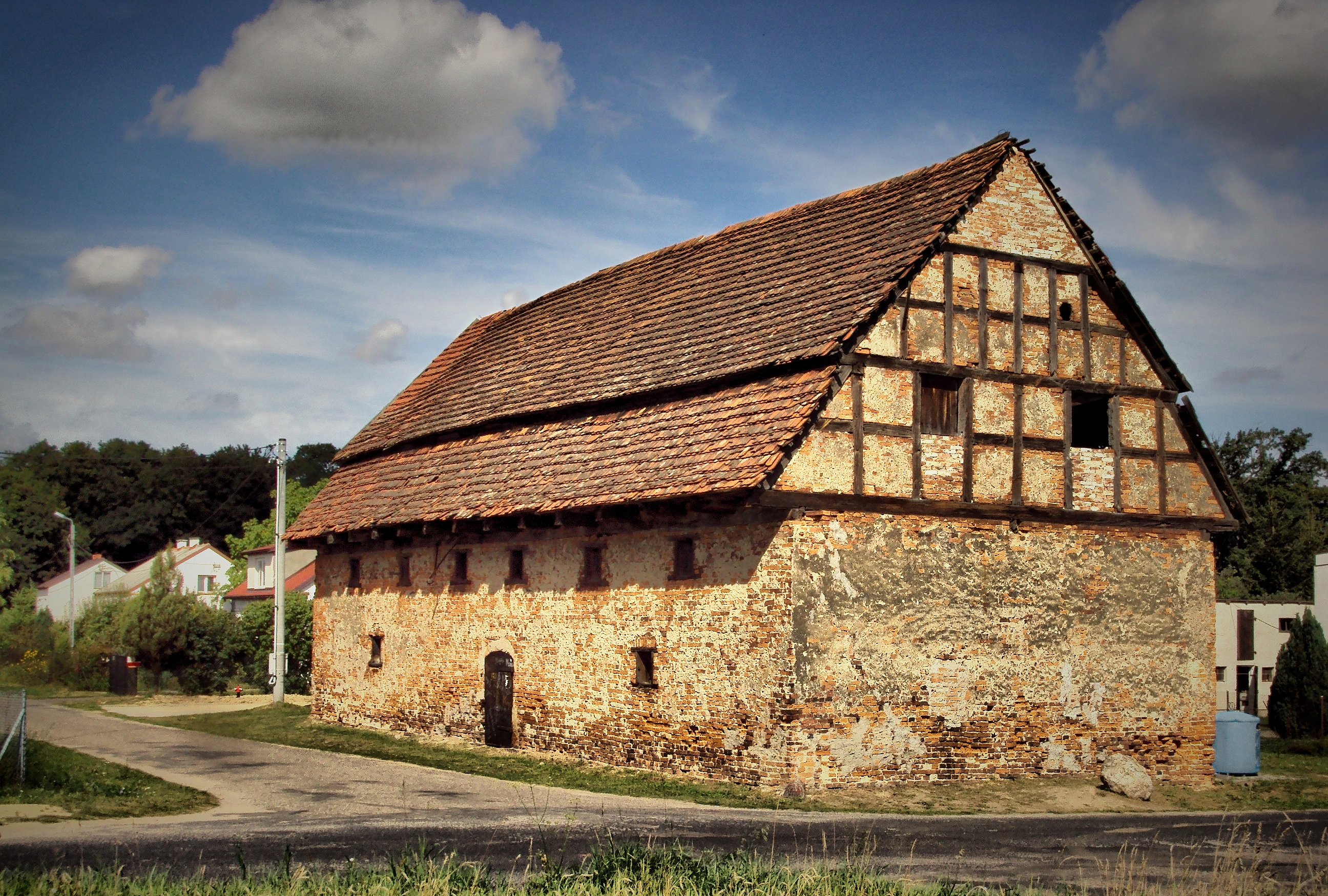 Spichlerz folwarczny, 1 poł. XIX w., Rusinowo (powiat rypiński)